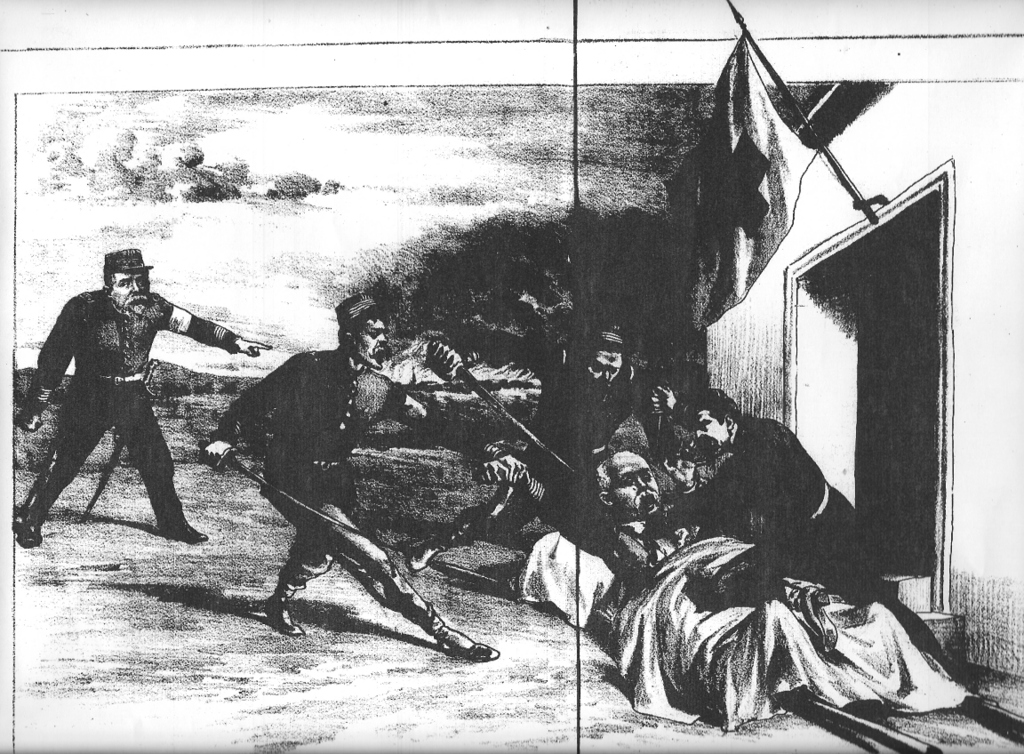 Grabado que representa el asesinato del coronel Eulogío Robles Pinochet, por las fuerzas congresistas en la batalla de Pozo Almonte.